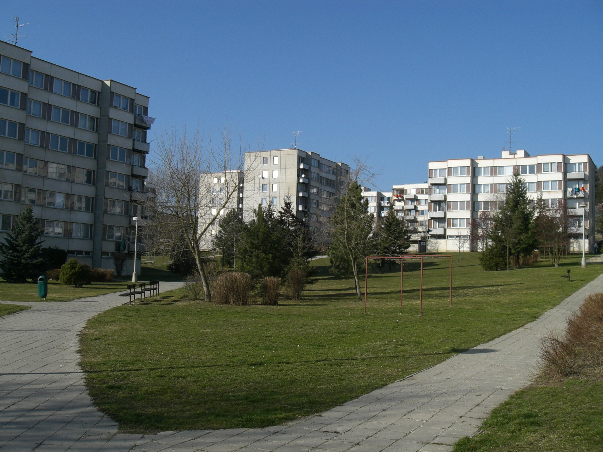 Hradiště (part of Písek town)